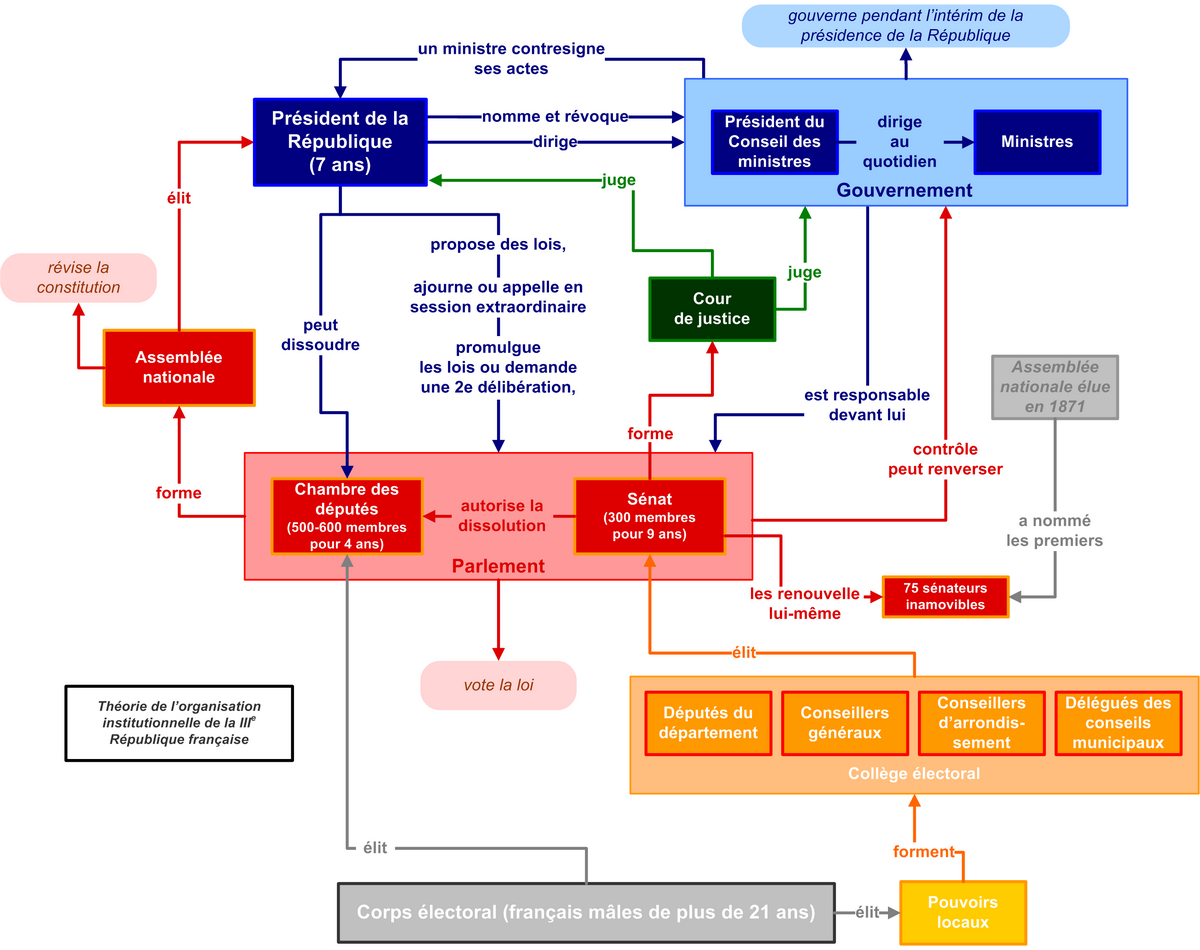 Organigramme réalisé sous Microsoft Visio représentant le fonctionnement théorique des institutions de la IIIe République française.